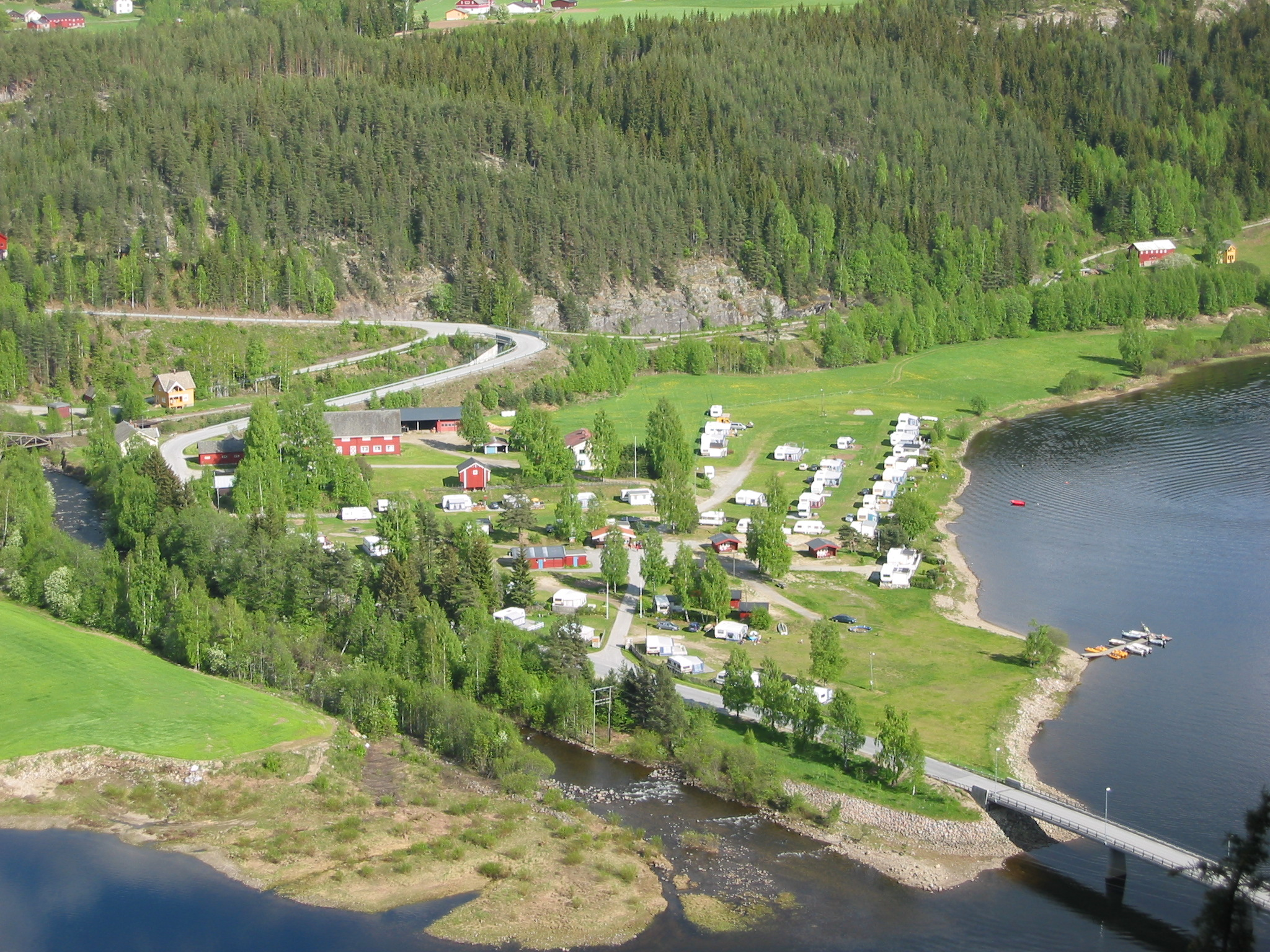 Bildet er tatt fra fjellet Beia mot øst, og viser Liodden og Liodden camping. Foto: Leif Liodden.